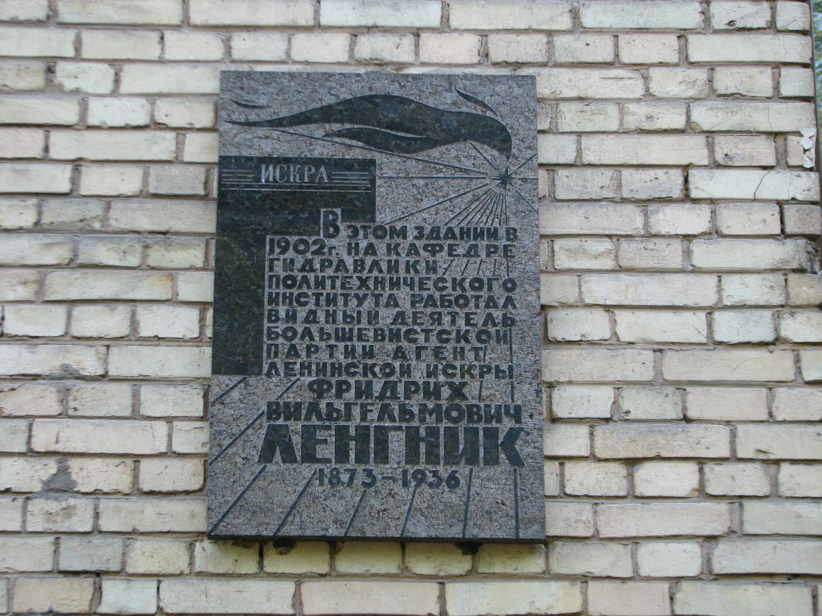 Мемориальная доска Ленгнику Ф.В., Киев